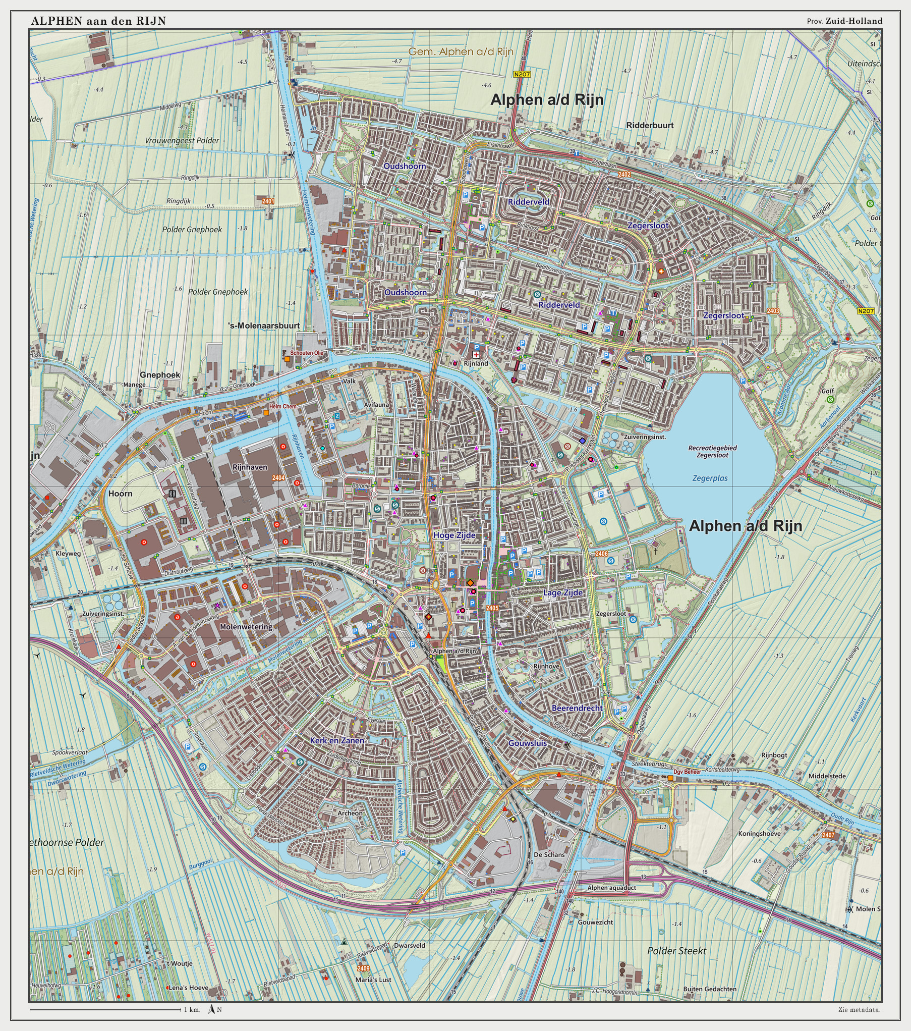 Topografische kaart van Alphen a/d Rijn (woonplaats). Resolutie: 300 pixels/km. Kaartbeeld samengesteld uit de open geodata van de Top10NL en Top25namen (Basisregistratie Topografie, Kadaster), Creative Commons BY licentie. Gebouwvlakken uit open geodata BAG extract. Wegen uit de OpenStreetMap, OpenStreetMap community. Reliëfschaduw uit de Actuele Hoogtekaart AHN2. Samenstelling en kleurenschema: Jan-Willem van Aalst, met QGIS2. Zie ook de Legenda.